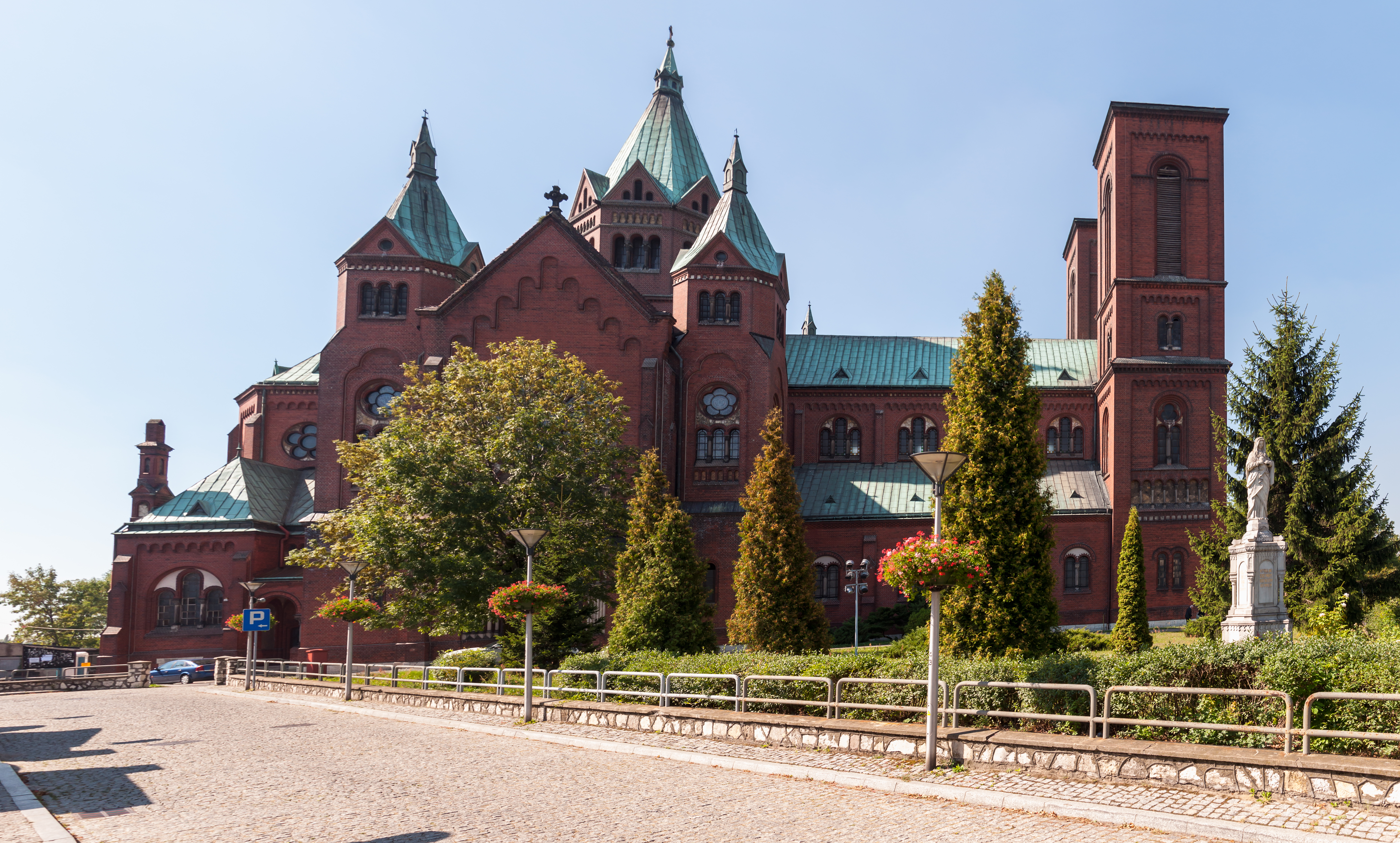 Czeladź. Kościół par. pw. św. Stanisława, 1906-1912.